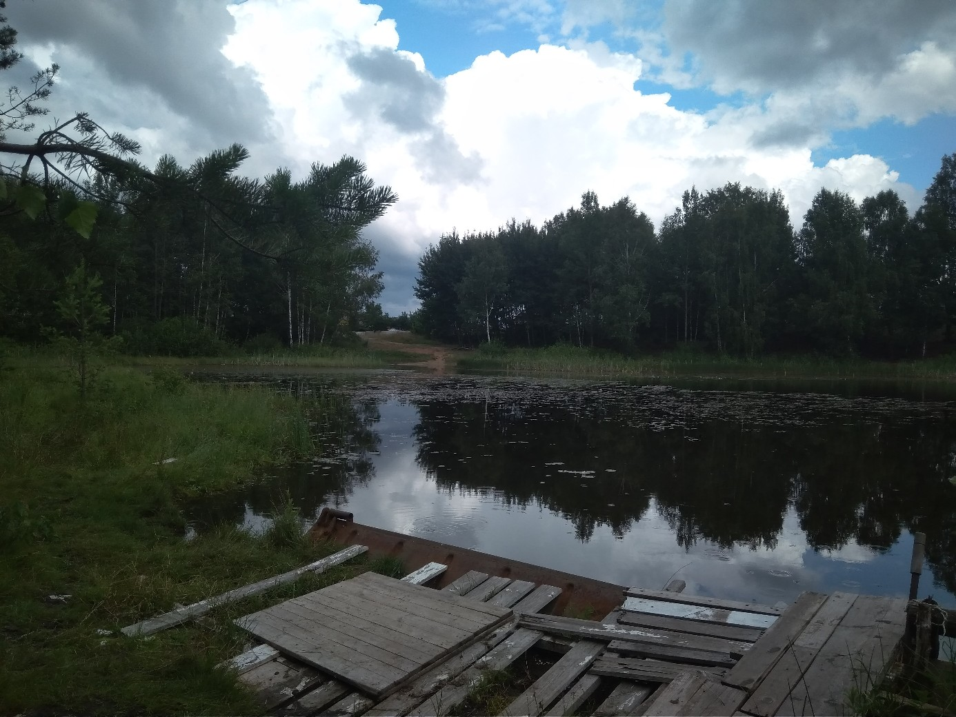 Безодницкое озеро (Дзержинский район)